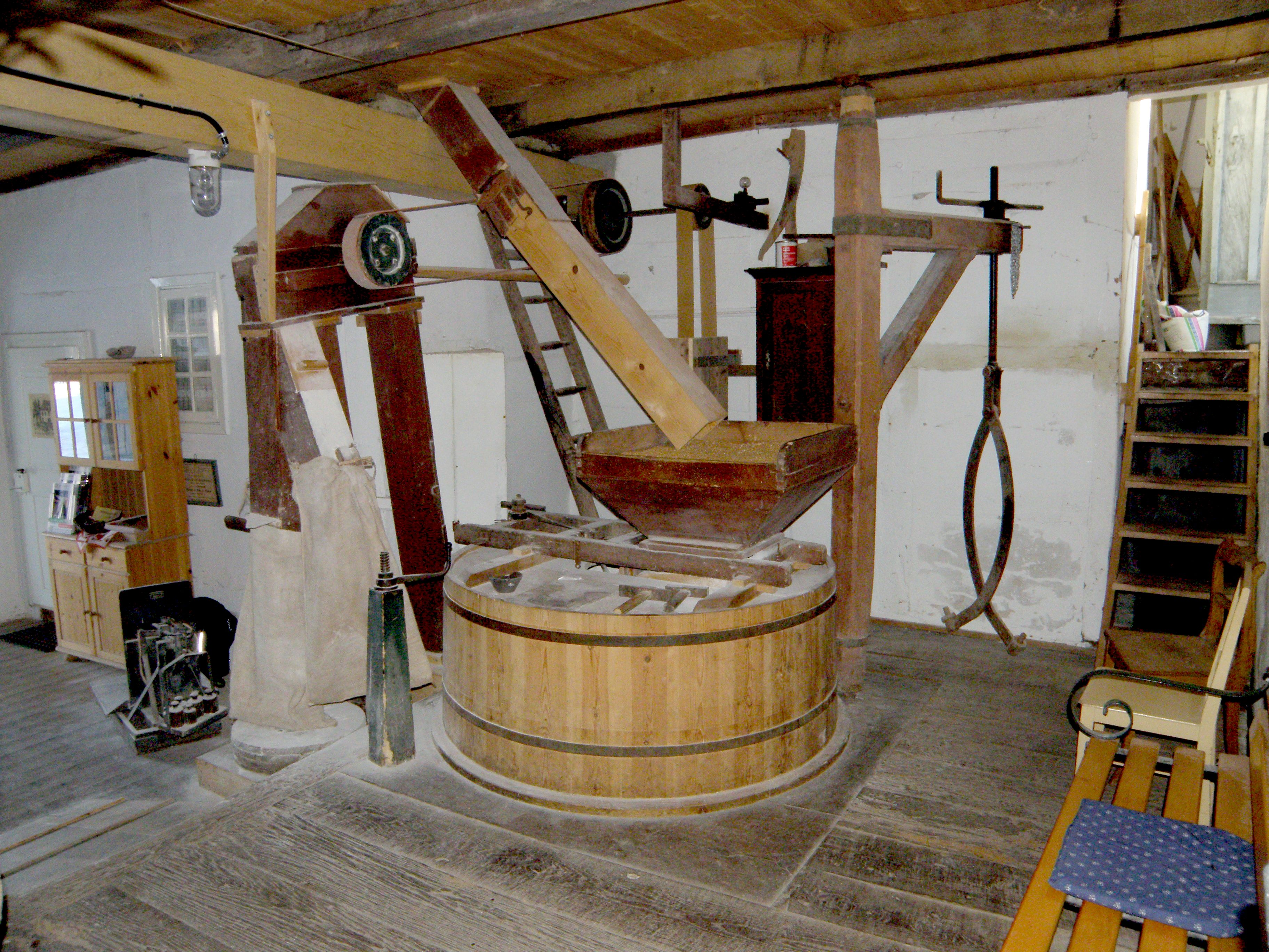 Zeigt den Mahlgang für Futterschrot. Zu erkennen ist auch der Elevator für das Mahlgut (links von der Bütte) sowie der Kran für den Läuferstein (rechts).